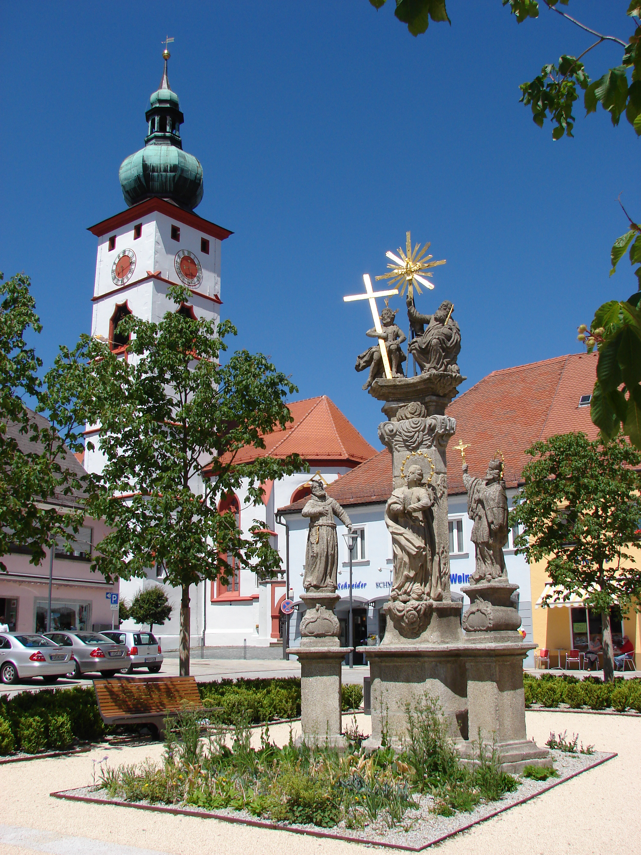 Kirche, Religion, Tirschenreuth, Marktplatz